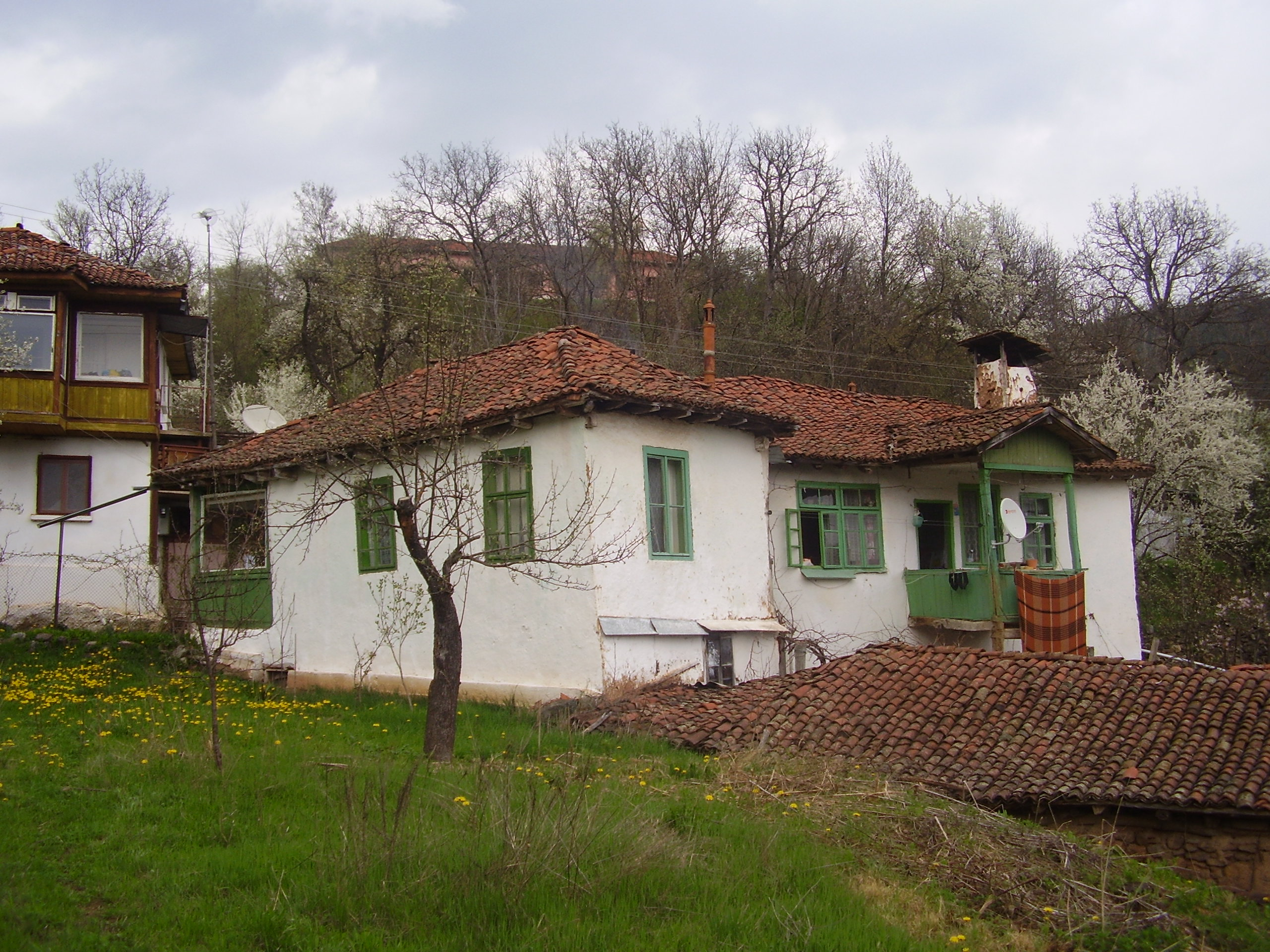 къща в с.Горно Уйно